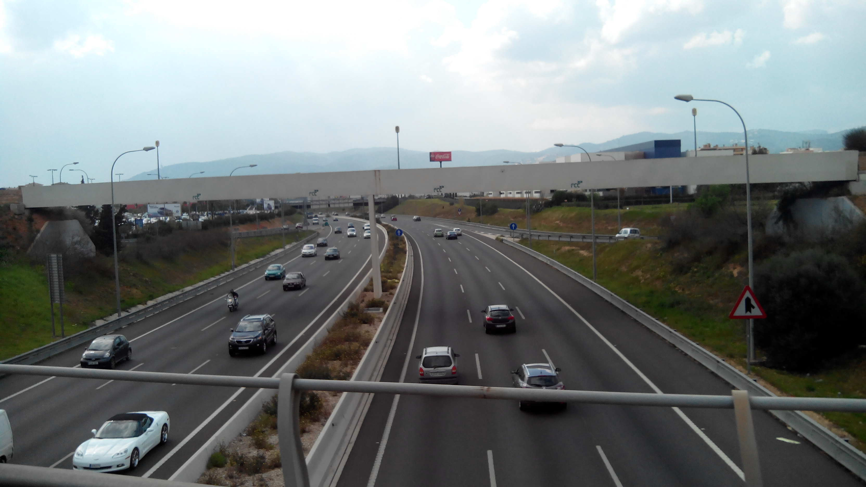 Via de Cintura, direcció ponent